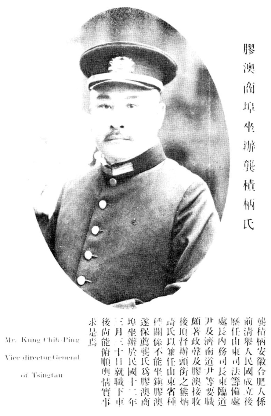 胶澳商埠坐办龚积柄